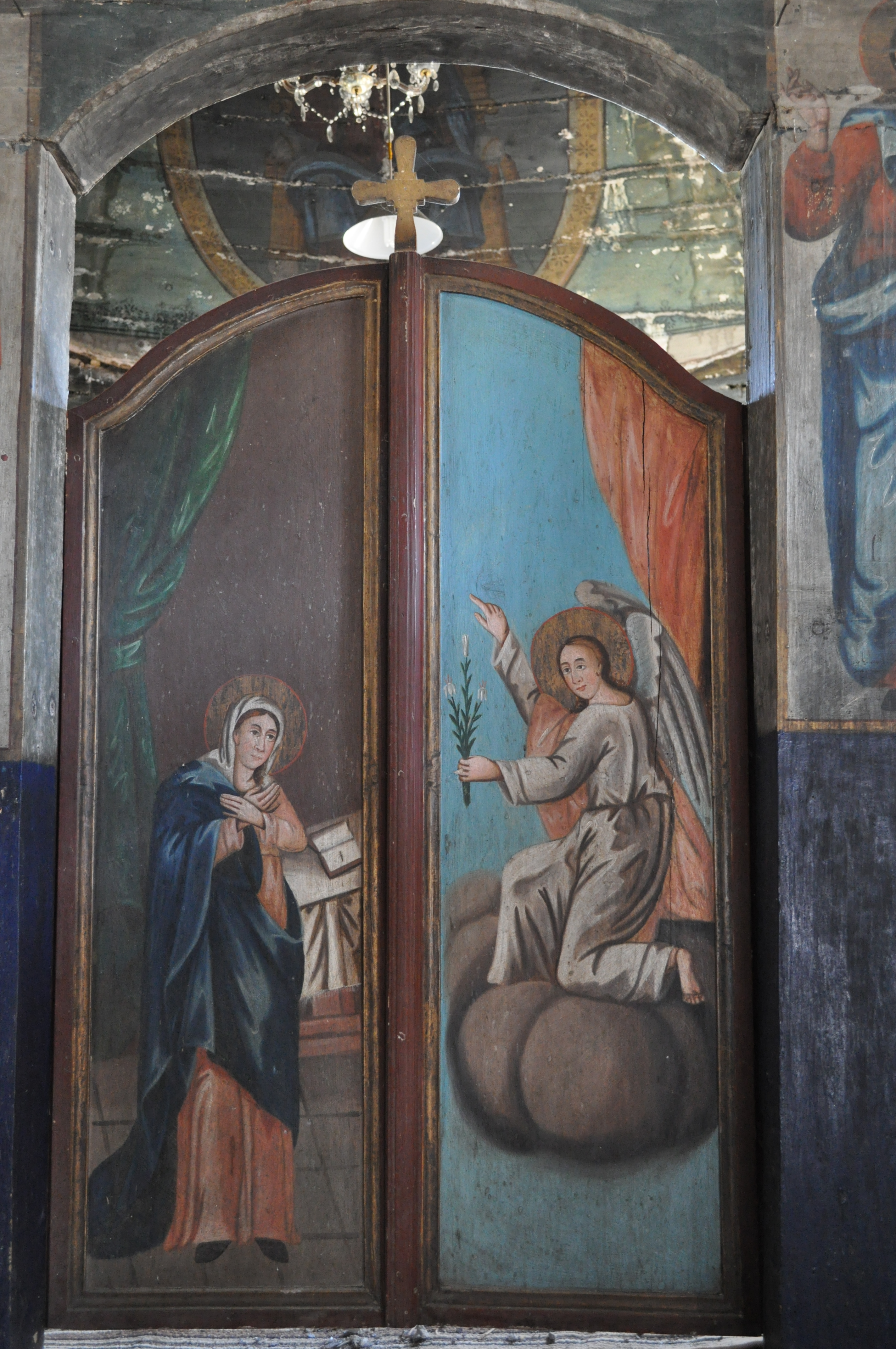 Biserica de lemn „Sfântul Mare Mucenic Gheorghe” din Ionești, județul Arad